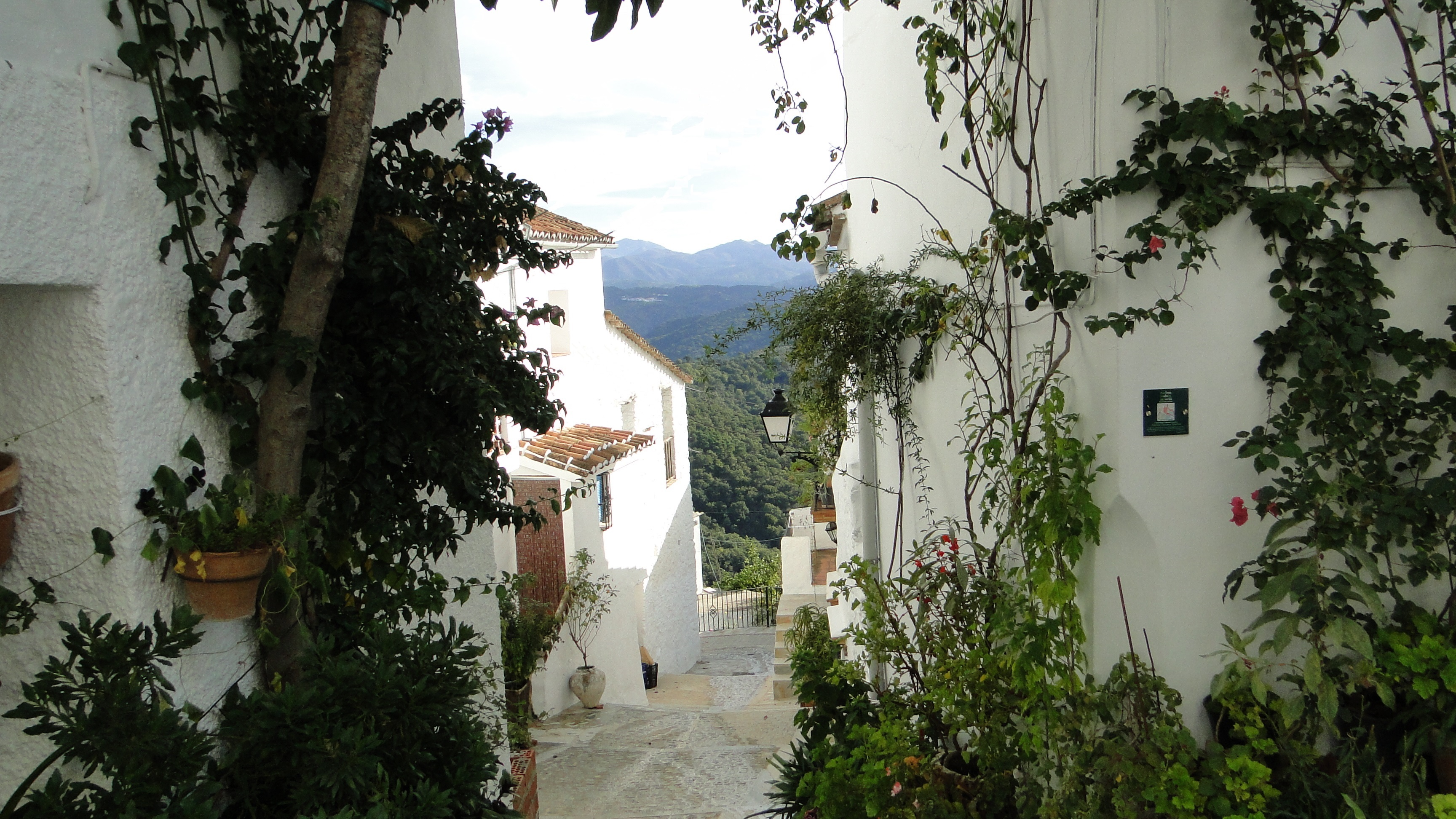 Benalauría (Málaga) - Valle del Genal